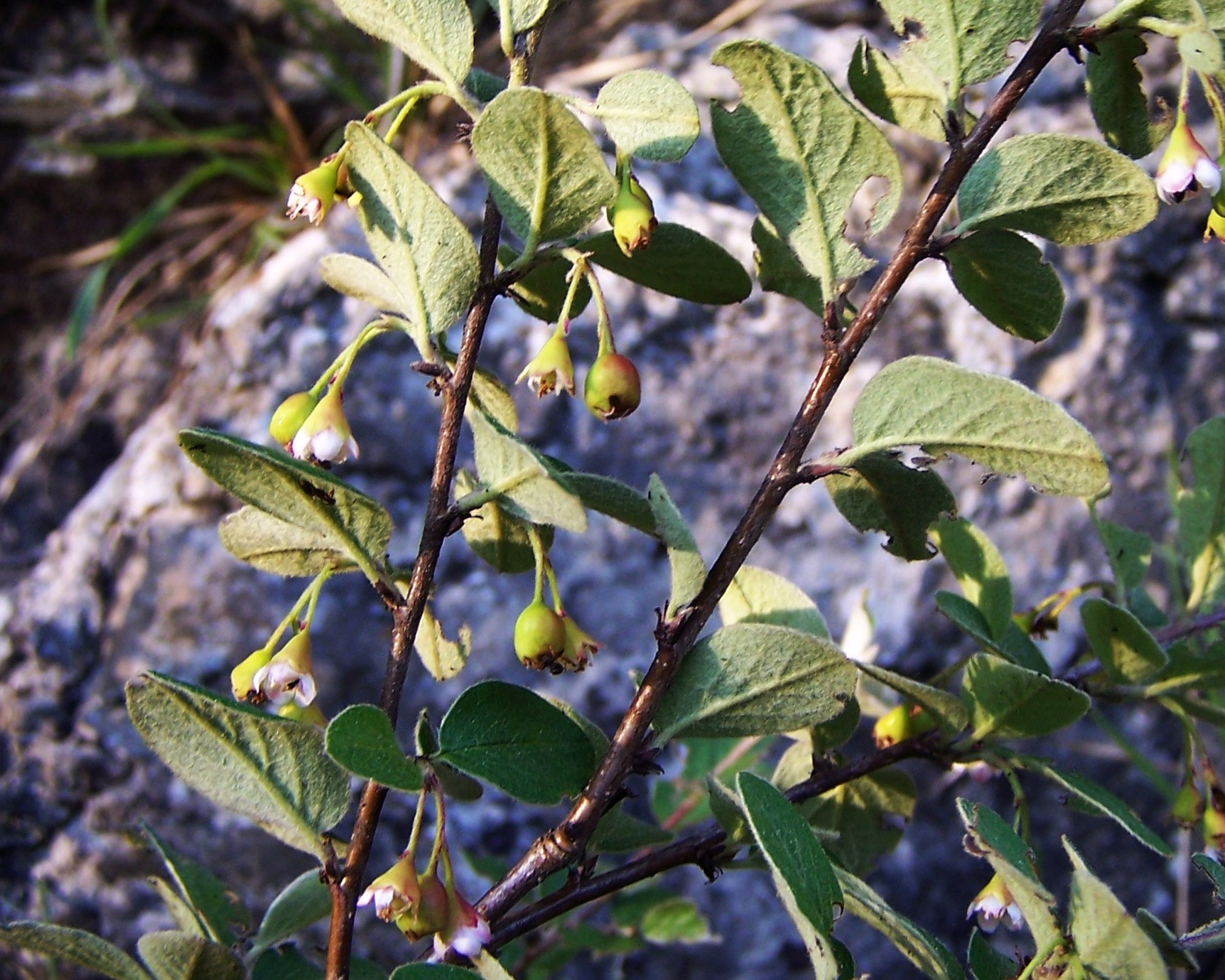 Cotoneaster niger (habitat:Pieniny, Kacze)